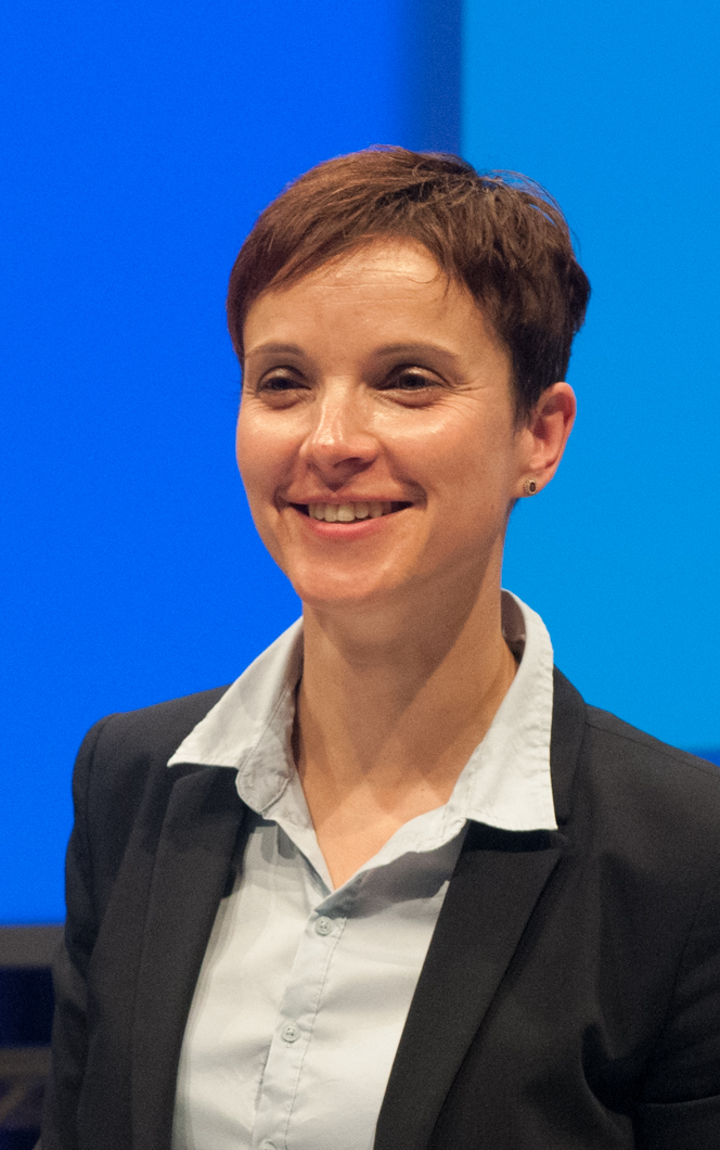 Frauke Petry am 4. Juli 2015 beim a.o. Bundesparteitag der Alternative für Deutschland (4./5. Juli 2015 in Essen, Gruga Halle)